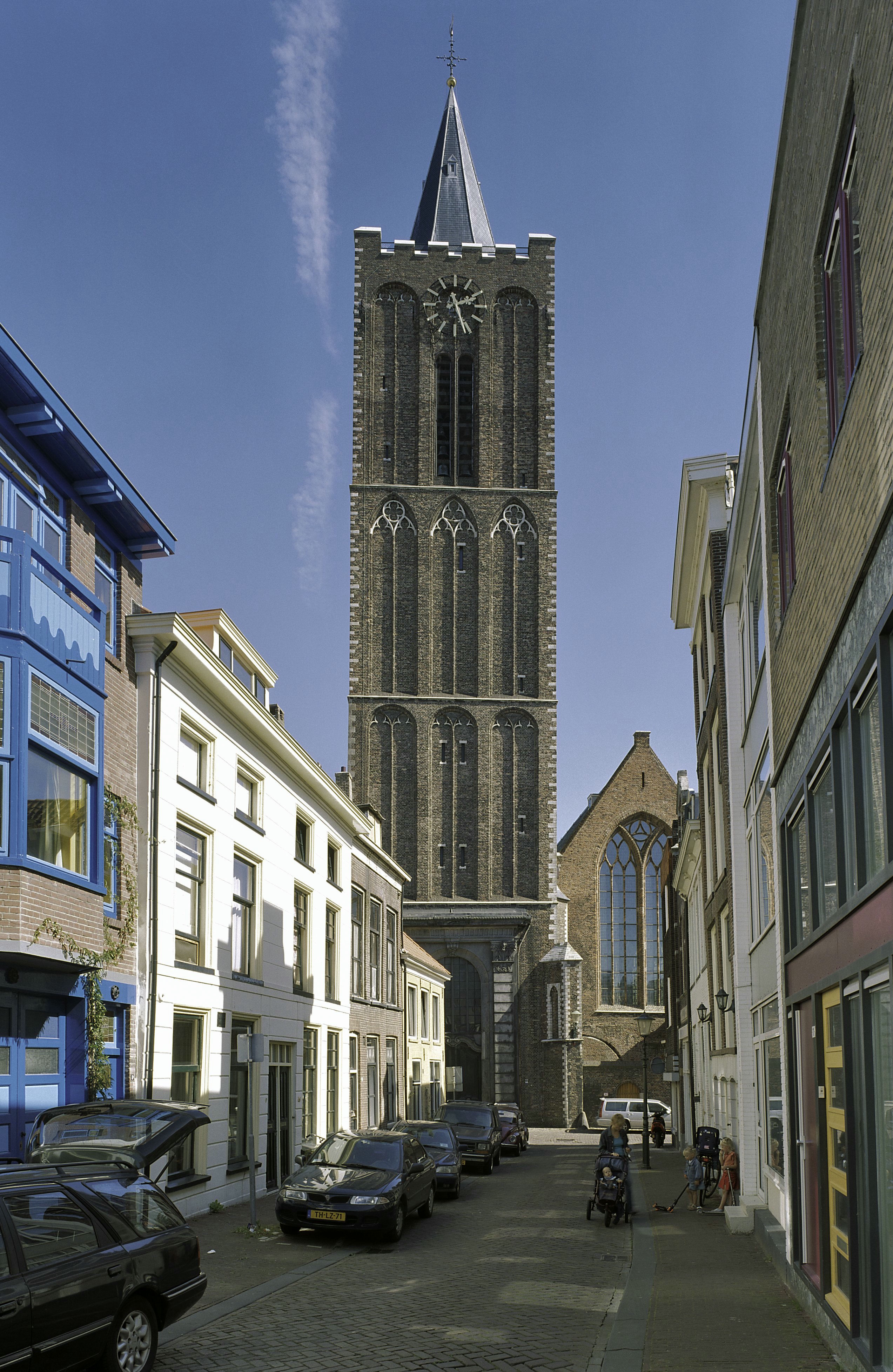 Hervormde Sint-Janskerk: Overzicht westgevel en kerktoren met omgeving (opmerking: Boek: "66 Kanjermonumenten")